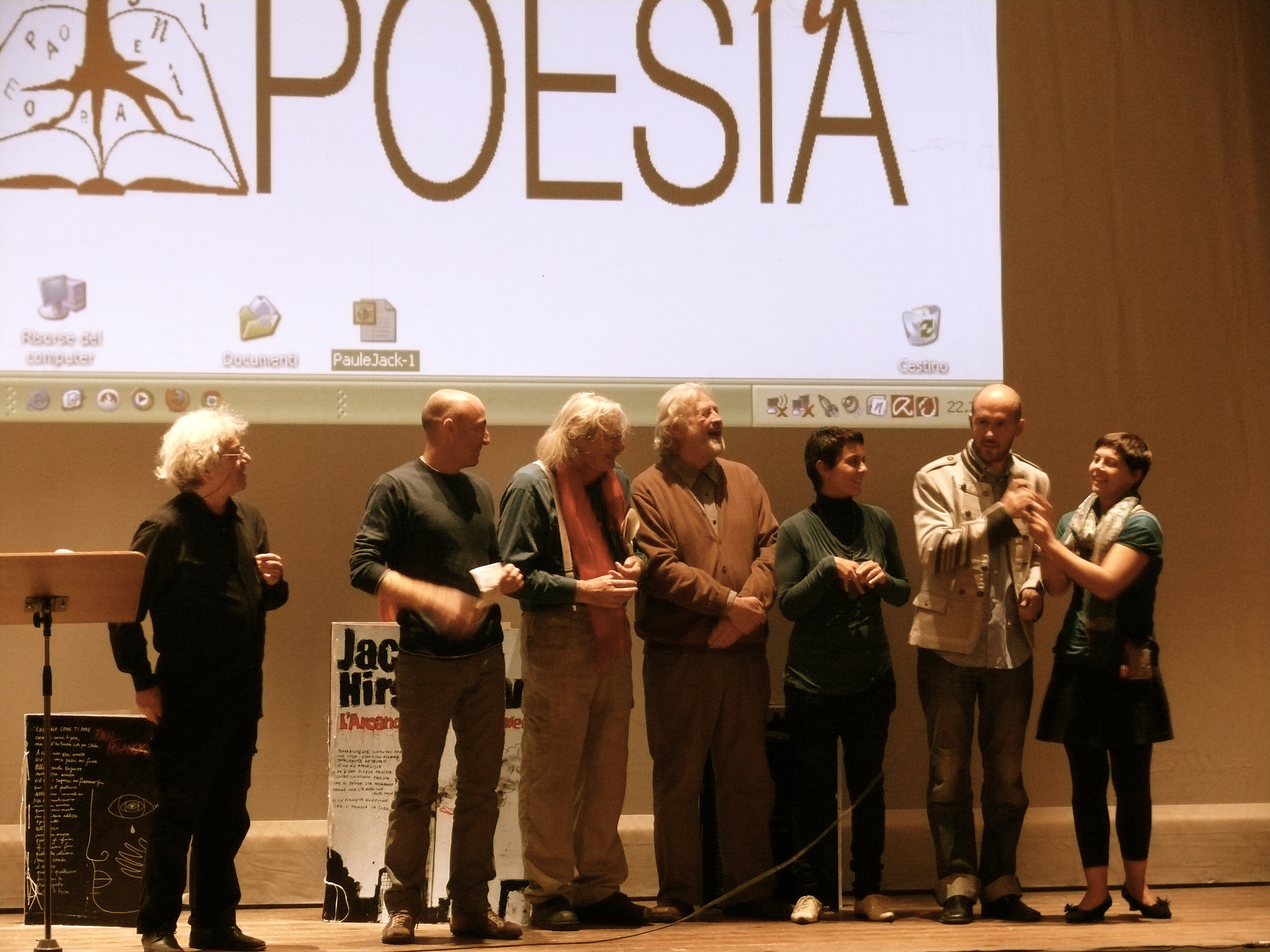 Ottobre in poesia - Beppe Costa, Leonardo Omar Onida, Jack Hirschman, Paul Polansky, Erika Pirodda, Luca Losito e Valeria Altzari al Teatro Civico.